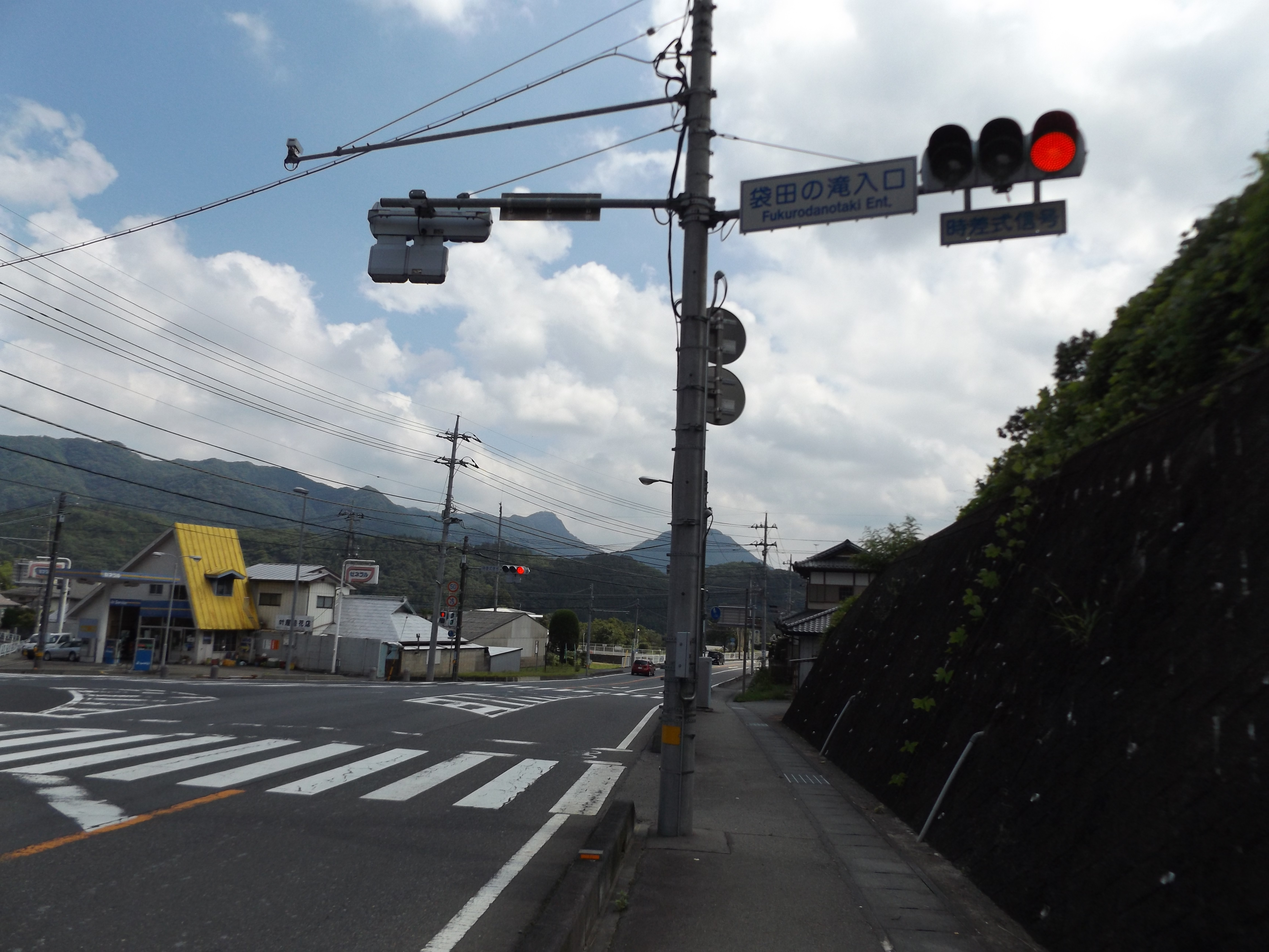 茨城県久慈郡大子町袋田にある国道118号「袋田の滝入口」交差点。 ここから国道461号が分岐する。 付近には同名の高速バスの停留所がある。